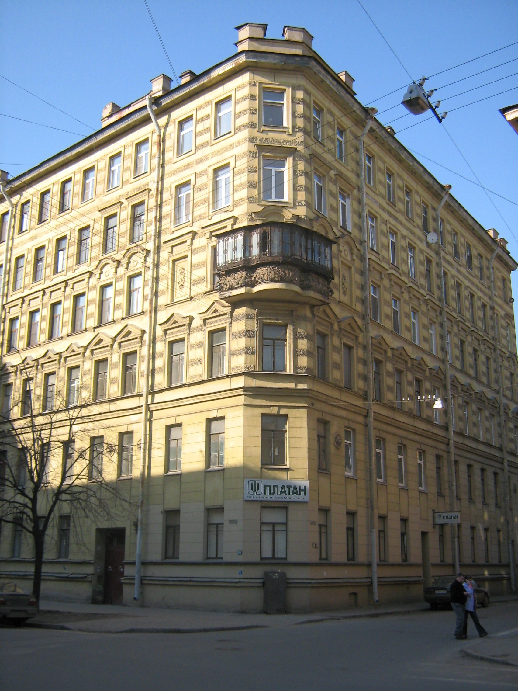 Zverinskaia Street and Mitninskii Lane corner (St.-Petersburg, Russia)